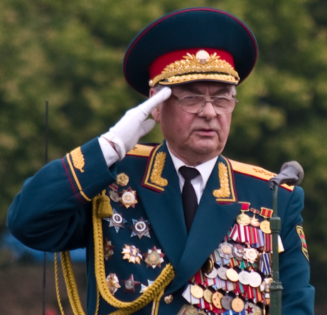 Станислав Галимович Хажеев, Министр обороны Приднестровской Молдавской Республики, приветствует военнослужащих Приднестровской армии в День независимости ПМР. Место: Тирасполь, площадь Суворова.